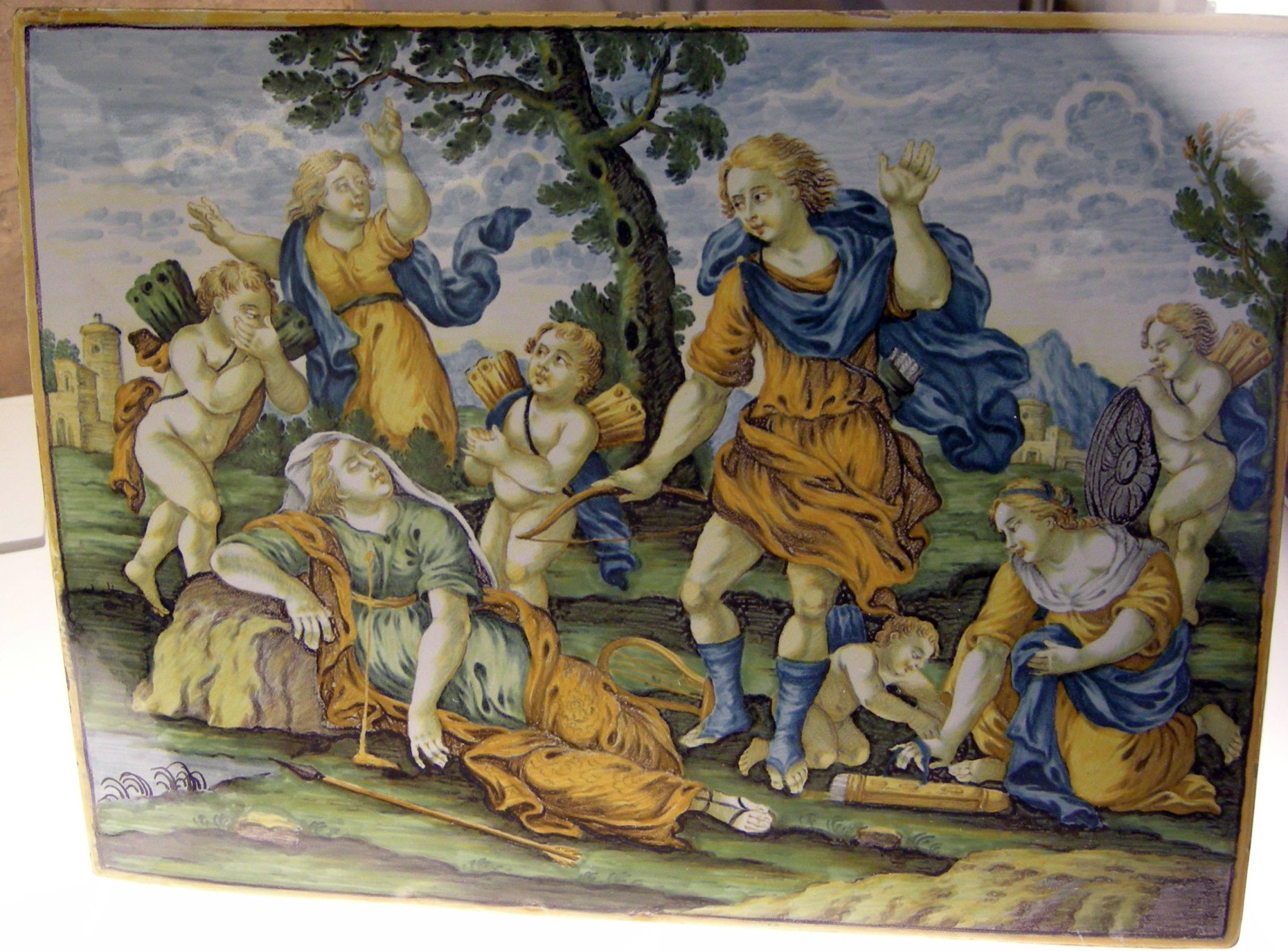 Palazzo Ducale di Urbino - Galleria Nazionale delle Marche - MIBAC This is a photo of a monument which is part of cultural heritage of Italy.